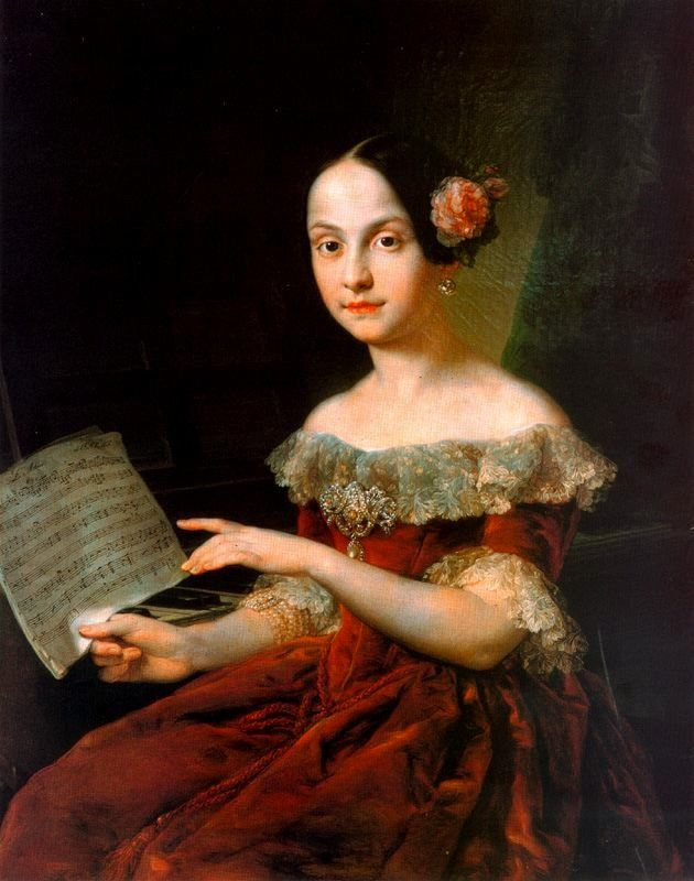 Retrato de la infanta Luisa Fernanda de Borbón (1832-1897), que fue hija del rey Fernando VII de España y hermana de la reina Isabel II.